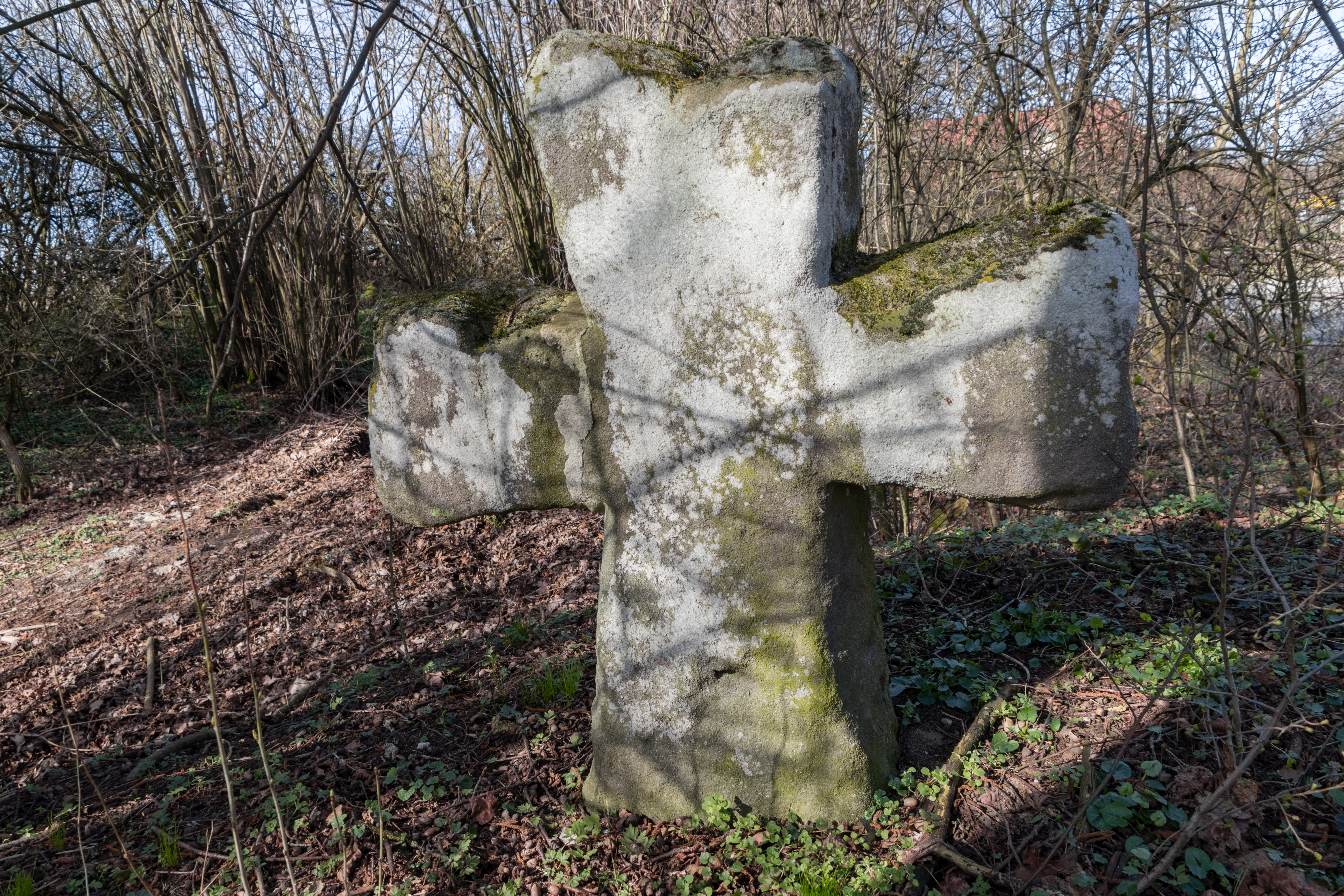 Steinkreuz, Richthof, Freystadt, Baudenkmal